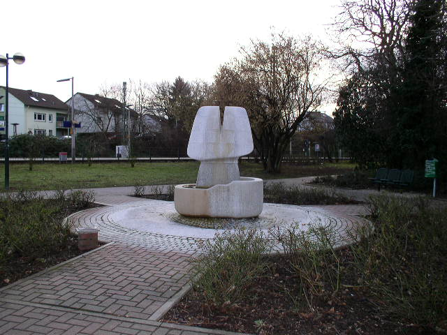 Fruchtbarkeits-Symbol am Bahnhof in Kriftel